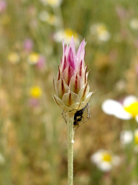 Xeranthemum inapertum photographié en Espagne